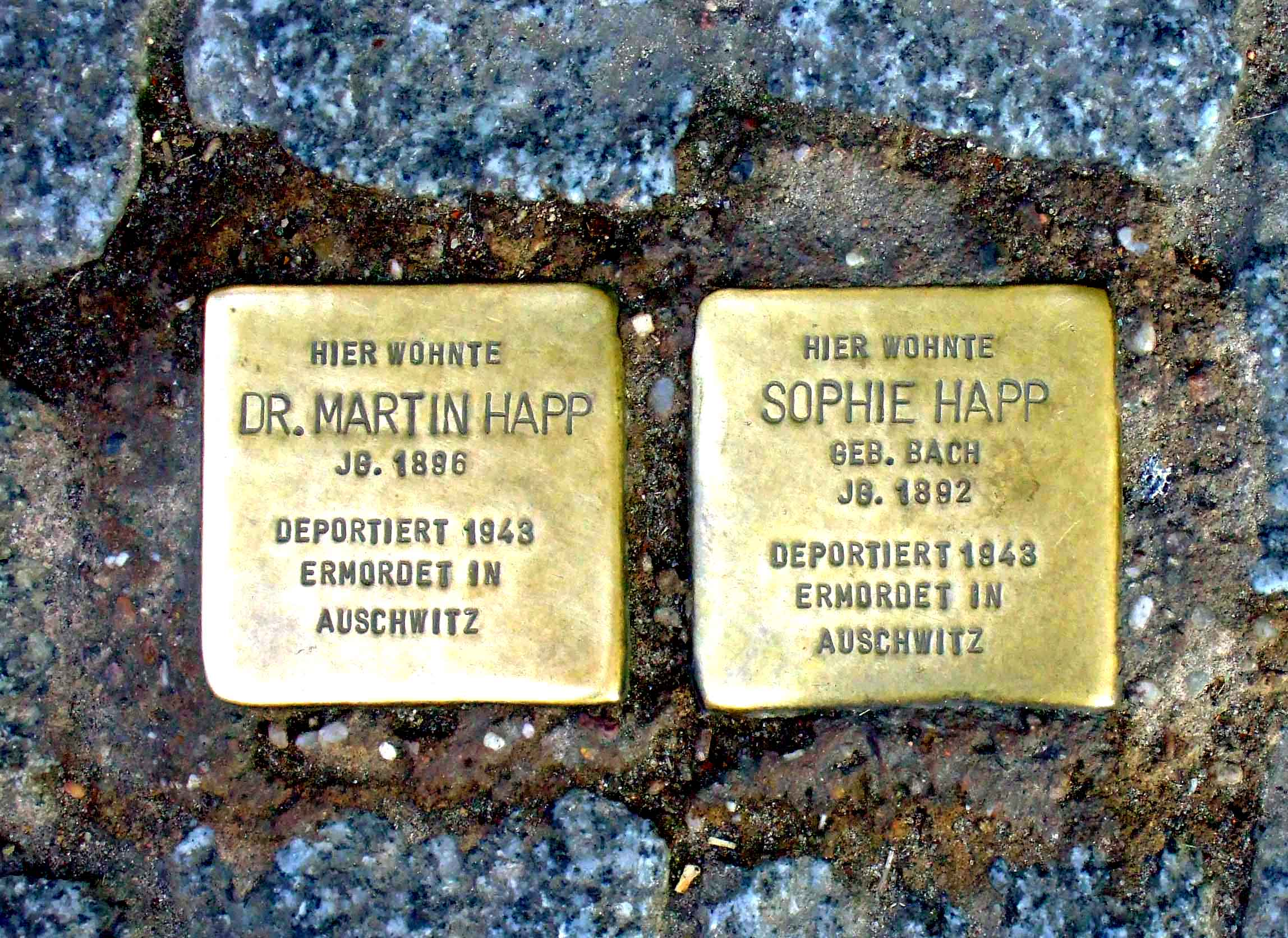 Stolperstein Happ, Martin und Sophie geb. Bach - Chausseestraße 6